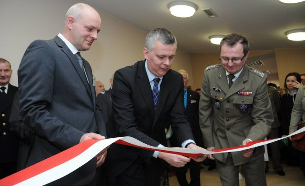 Szczecin, 09.05.2014 r. Minister Obrony Narodowej Tomasz Siemoniak w 109 Szpitalu Wojskowym